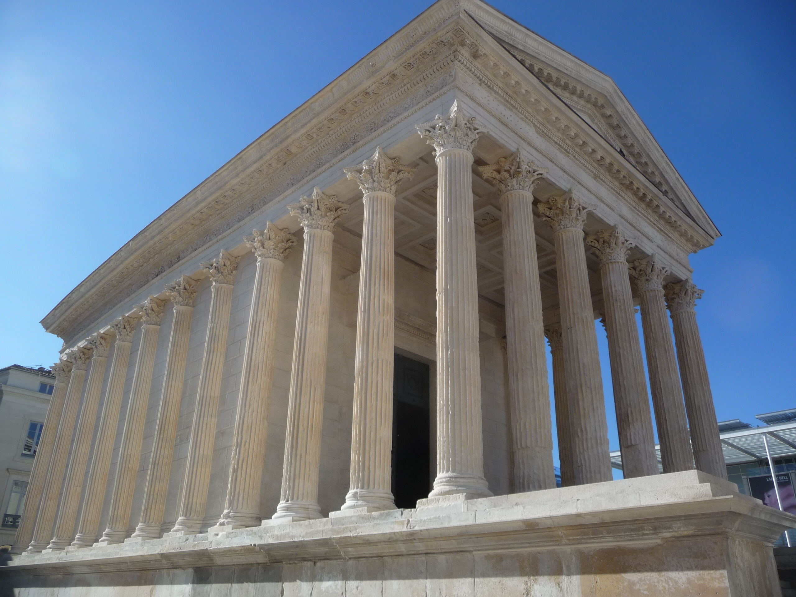 Vue Sud-Ouest .